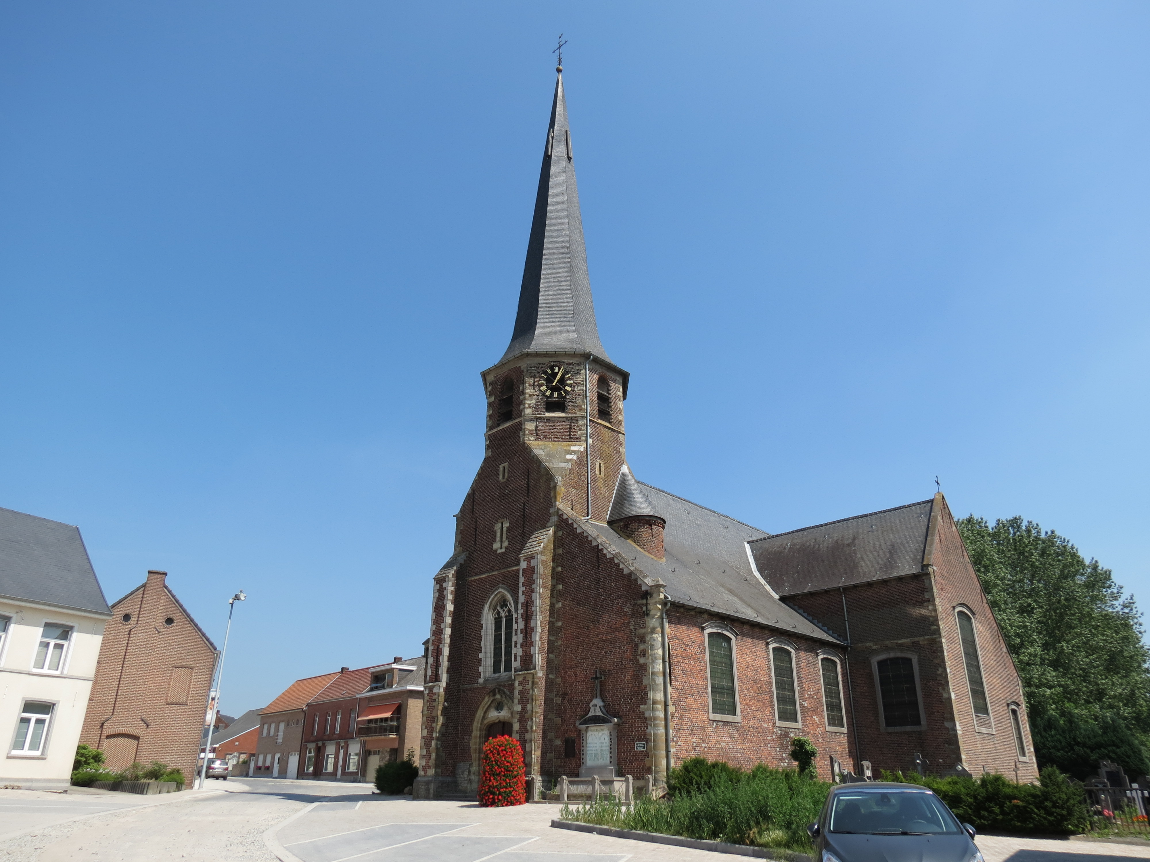 Geraardsbergen - Idegem - Idegemplein - Parochiekerk Sint-Pieters-Banden